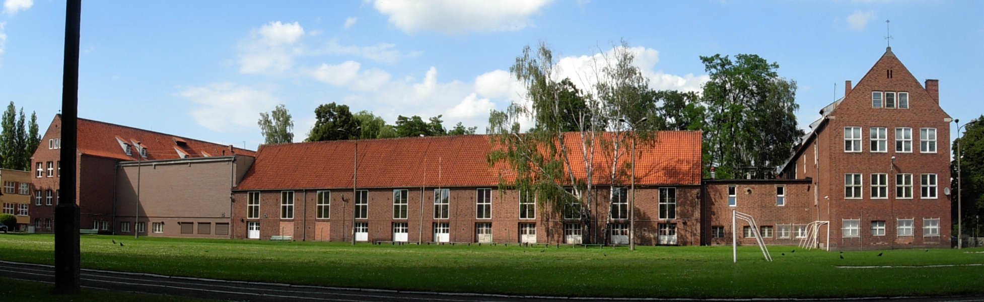 Uniwersytet Kazimierza Wielkiego w Bydgoszczy. Kampus uczelni przy ul. Chodkiewicza